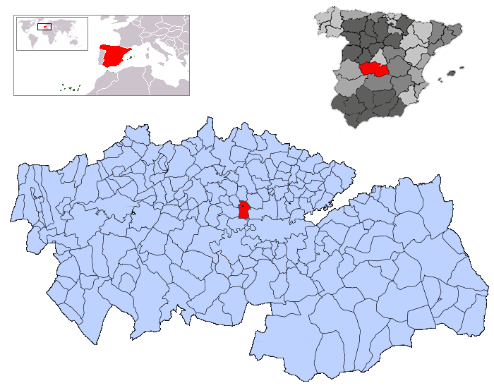 Rielves en la provincia de Toledo